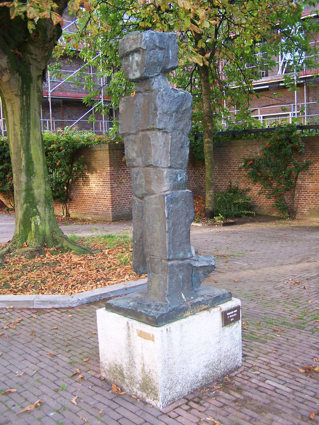 Gehender (Gaande man) made in 1974 by Fritz Wotruba, placed at the Mariaplaats in Utrecht.